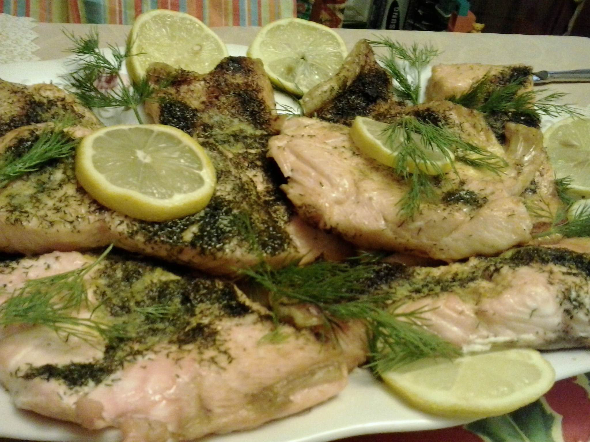 Pieczony łosoś z koperkiem i cytrynami.